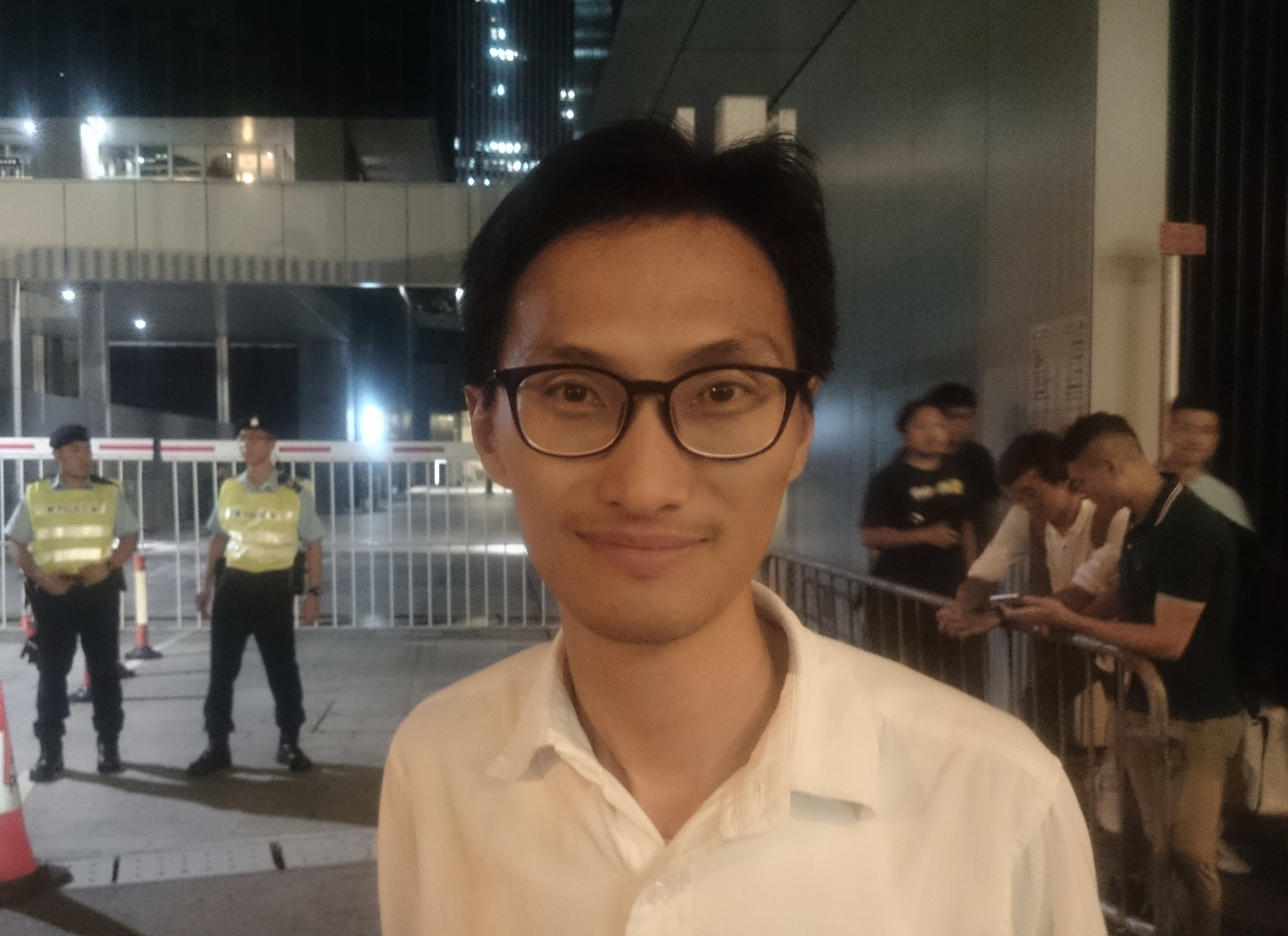 粵語: 2017年8月16號夜晚，朱凱廸喺反東北案被告聲援集會度。當時，反東北案被告聲援集會喺公民廣場隔籬舉行。